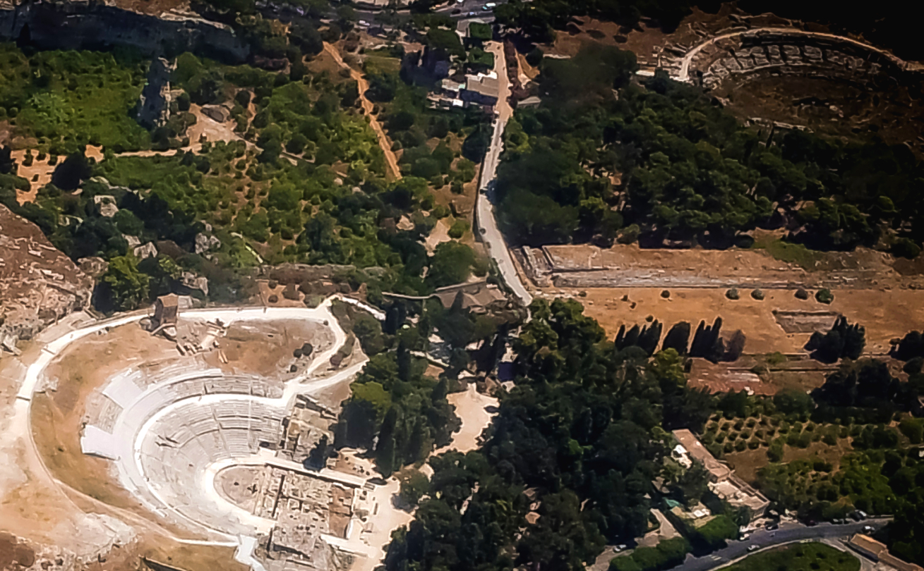 Parco Archeologico Neapolis